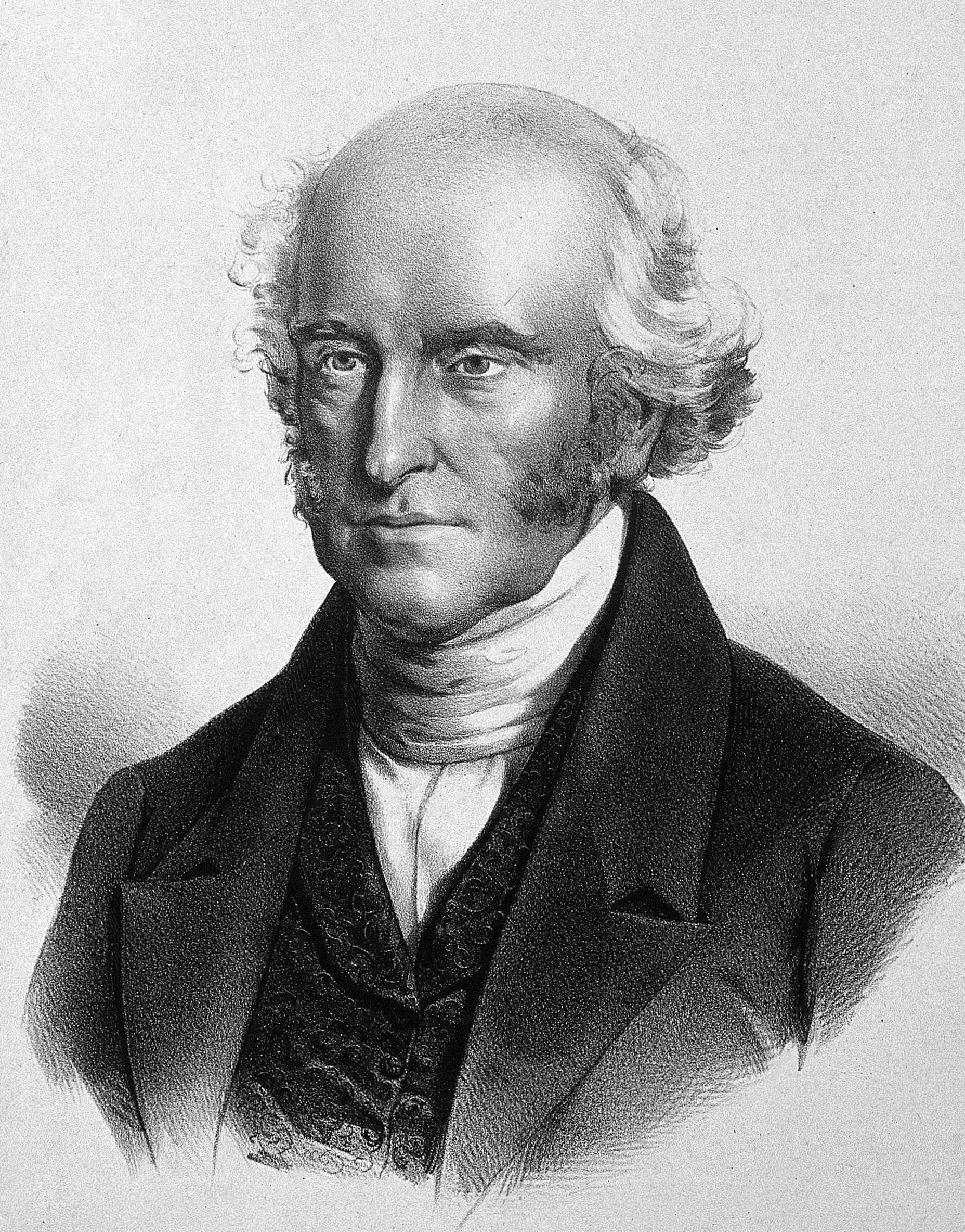 Robert Graham (botanist)